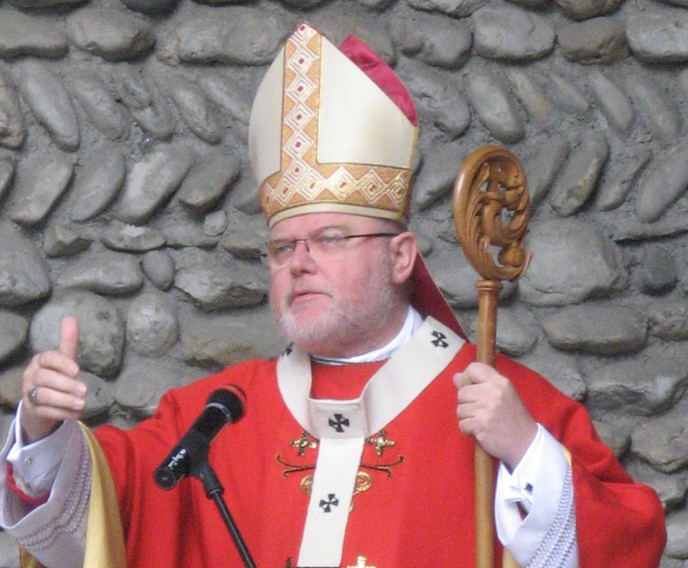 Bischofsstab, von Häftlingen angefertigt im KZ Dachau für Priesterweihe von Karl Leisner